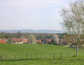 village de Botans (Territoire de Belfort) avec le massif des Vosges en toile de fond. Photo prise le 20 avril 2004 par LP90. Licence GFDL LP90 avril 2004